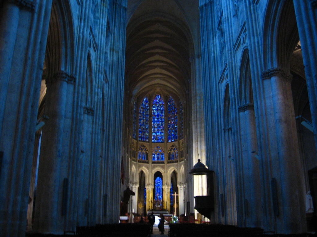 Intérieur de la cathédrale Saint-Gatien de Tours.